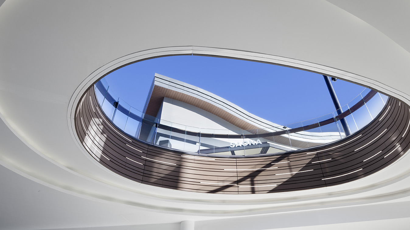 Le bois hybride peut être cintré afin d'épouser toute forme de façade